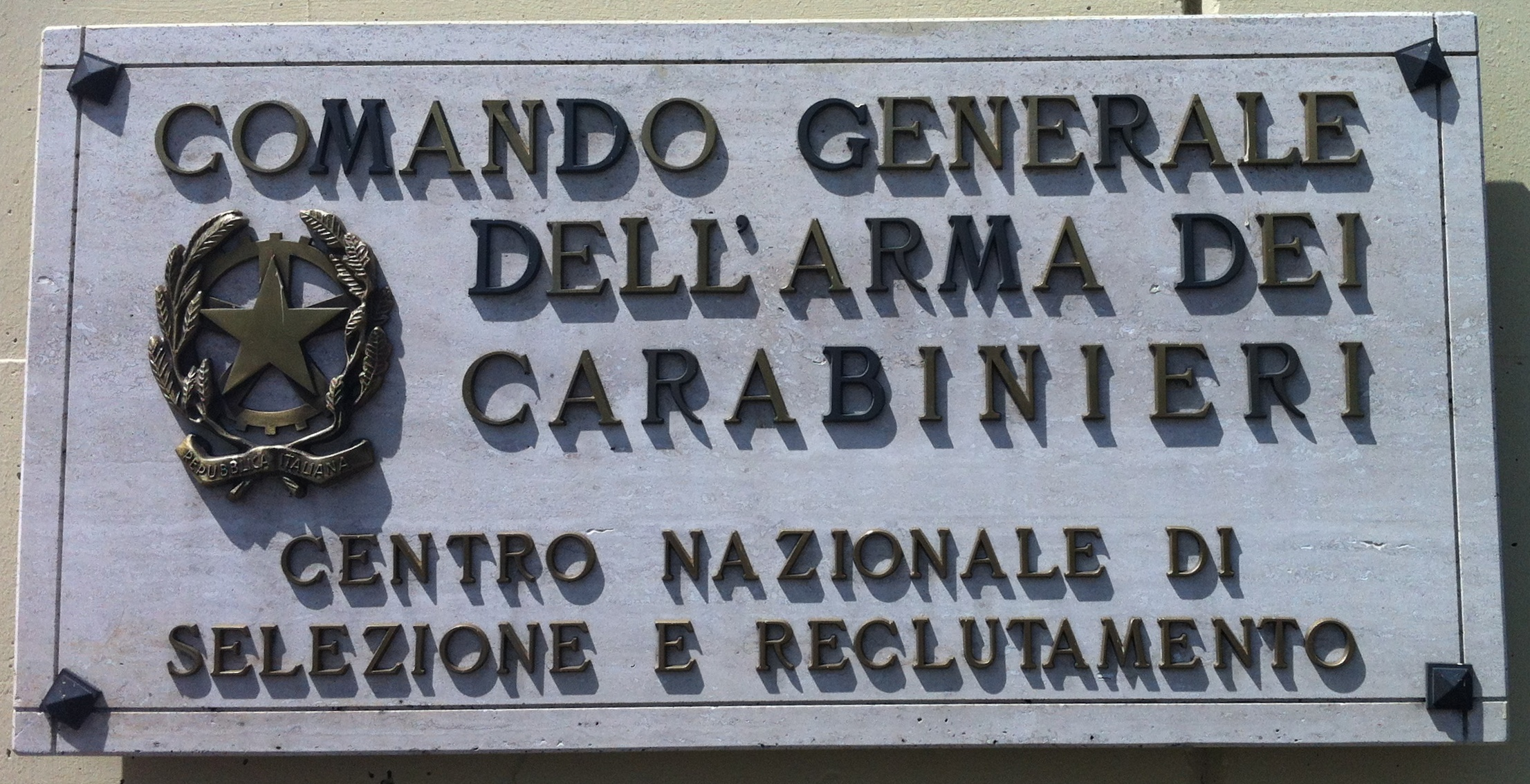 Targa del Centro Nazionale di Selezione e Reclutamento dell'Arma dei Carabinieri. La targa si trova all'esterno della caserma, presso l'entrata concorrenti in Viale di Tor di Quinto.